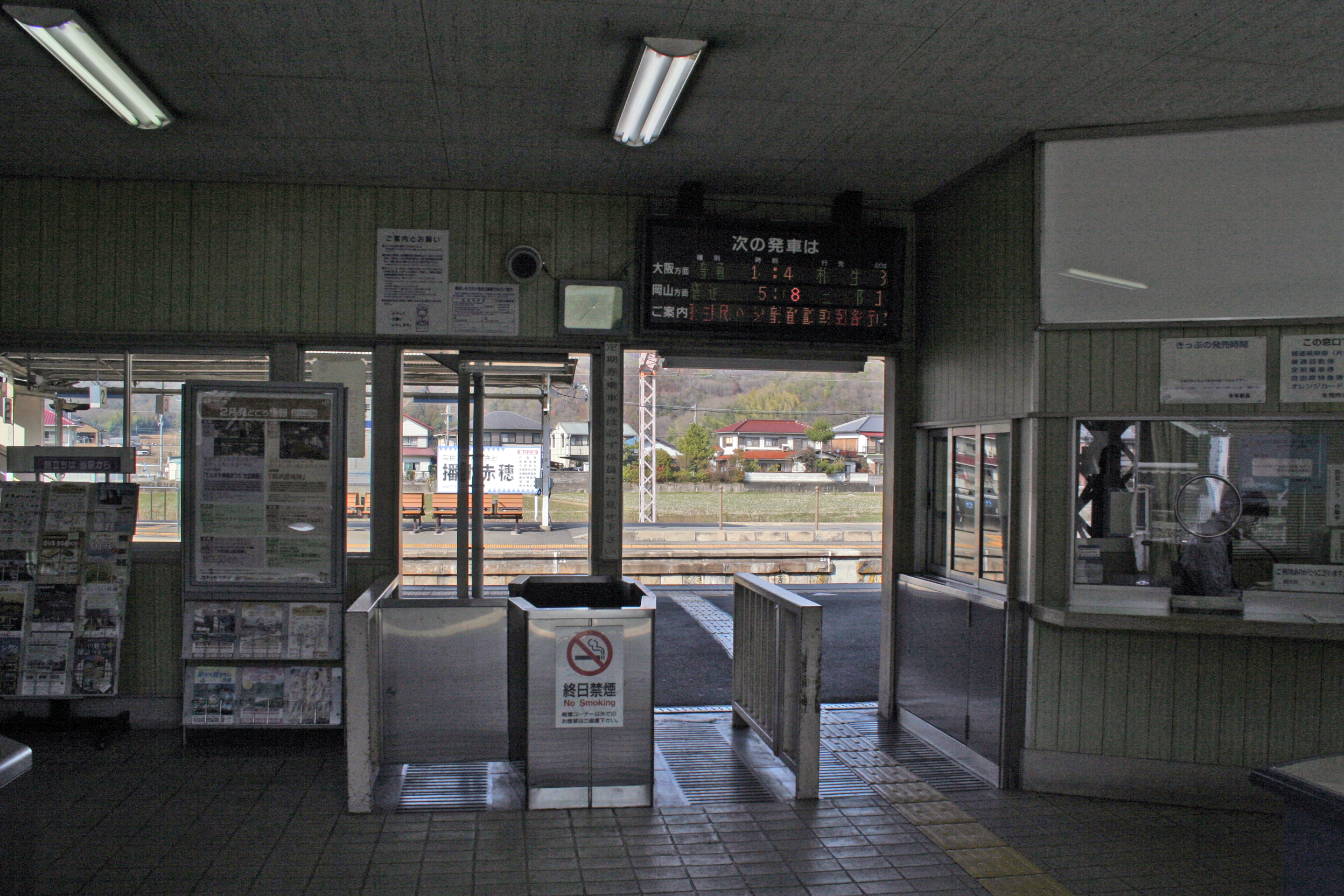 有年駅駅舎内にある改札口。